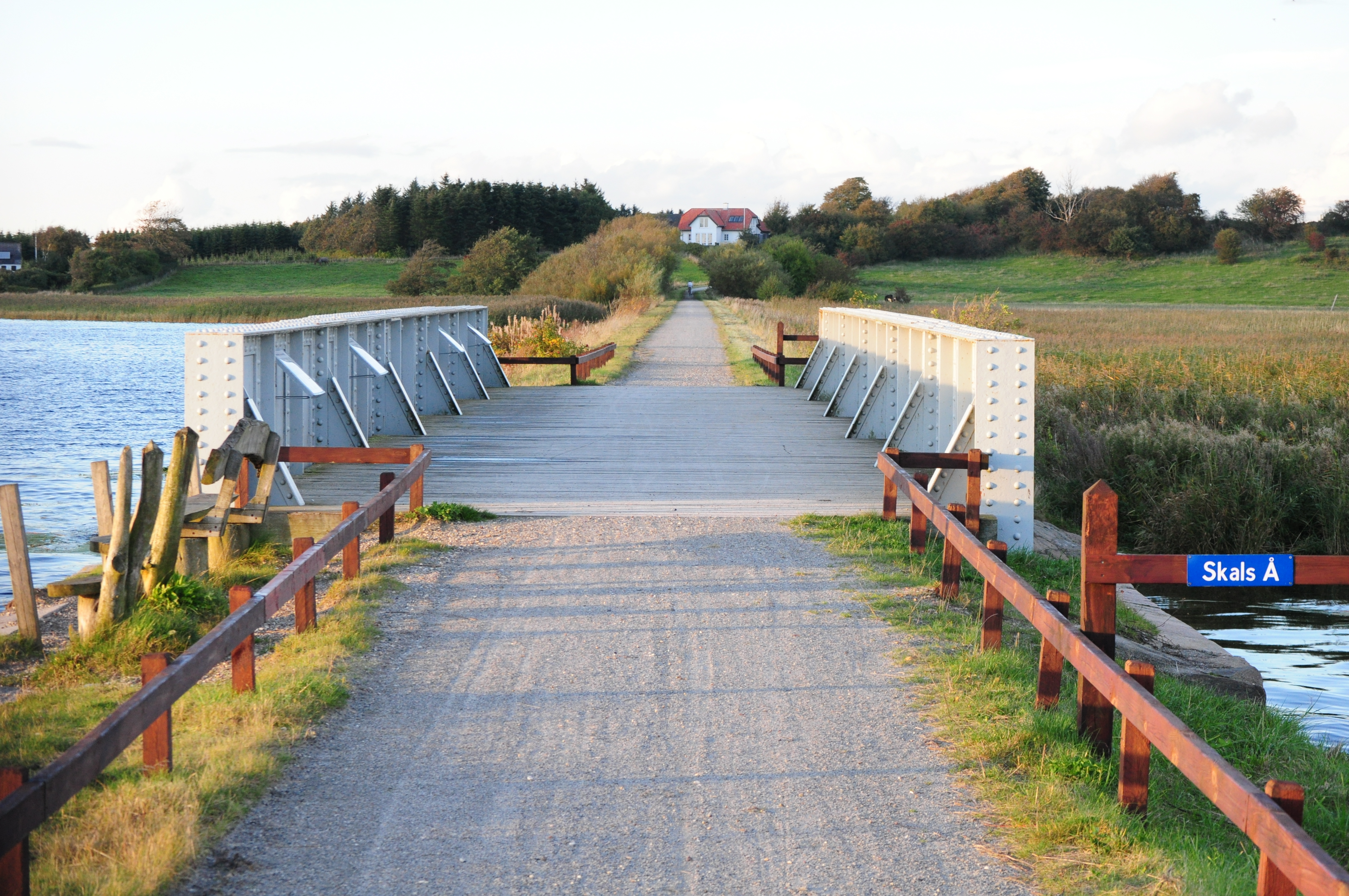 Himmerlandsstien føres via gammel jernbanebro over Skals Å